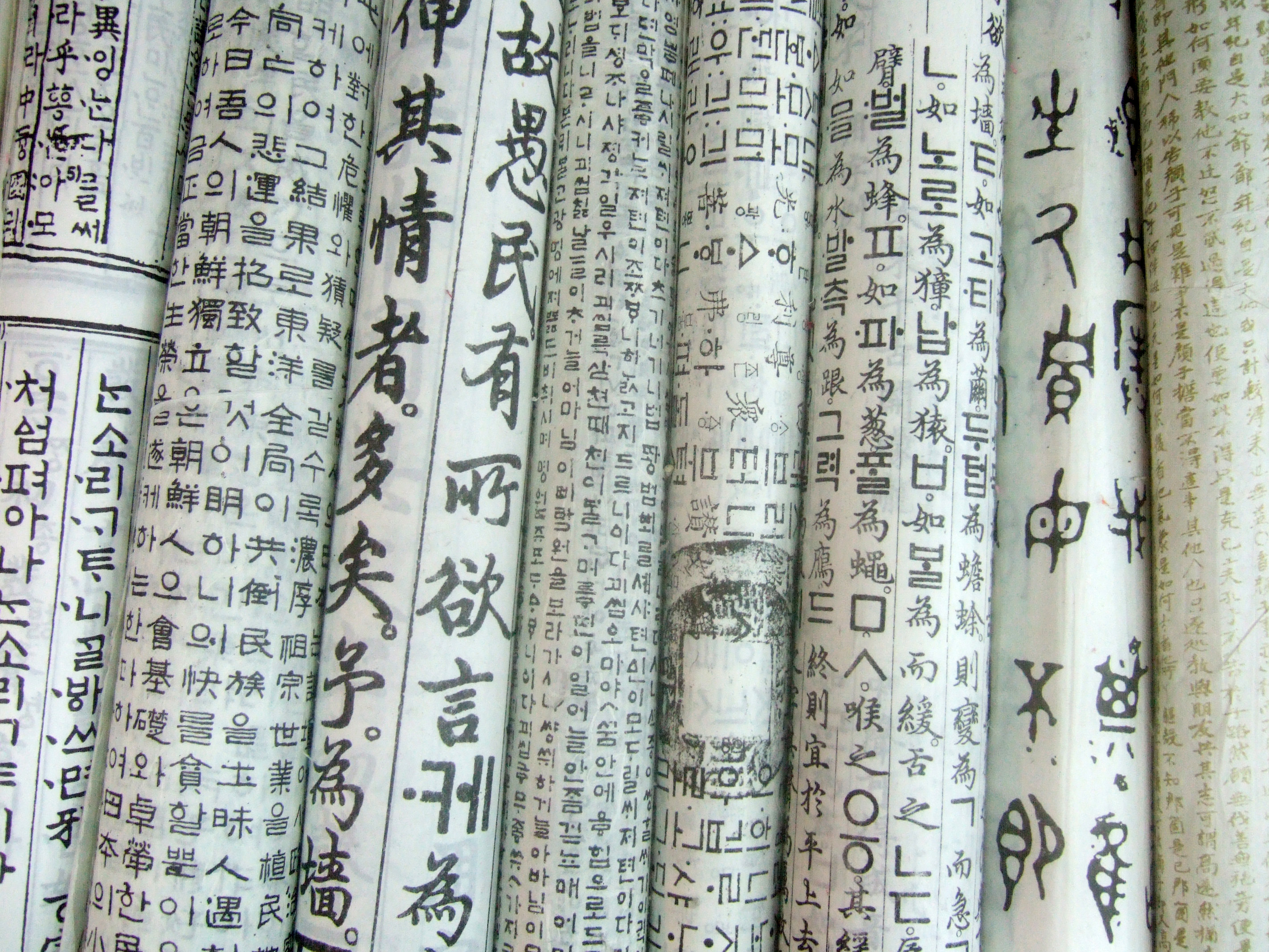 Hangul on korean papers in Insadong, Seoul, Korea